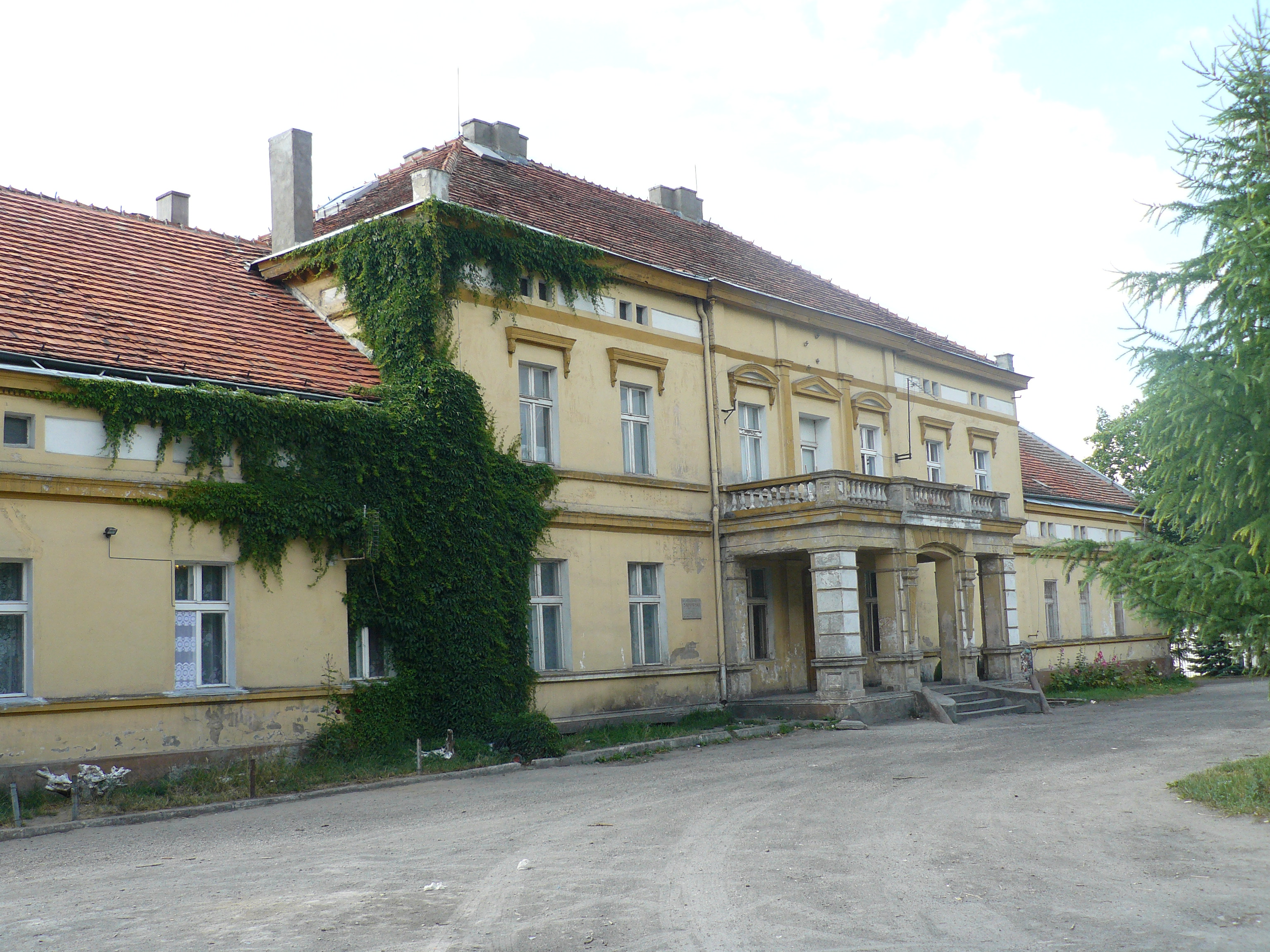 zespół dworski, XVIII/XIX, 1880: dwór (dec. pałac); park, k. XIX widok od frontu Słupy, Gmina Szubin